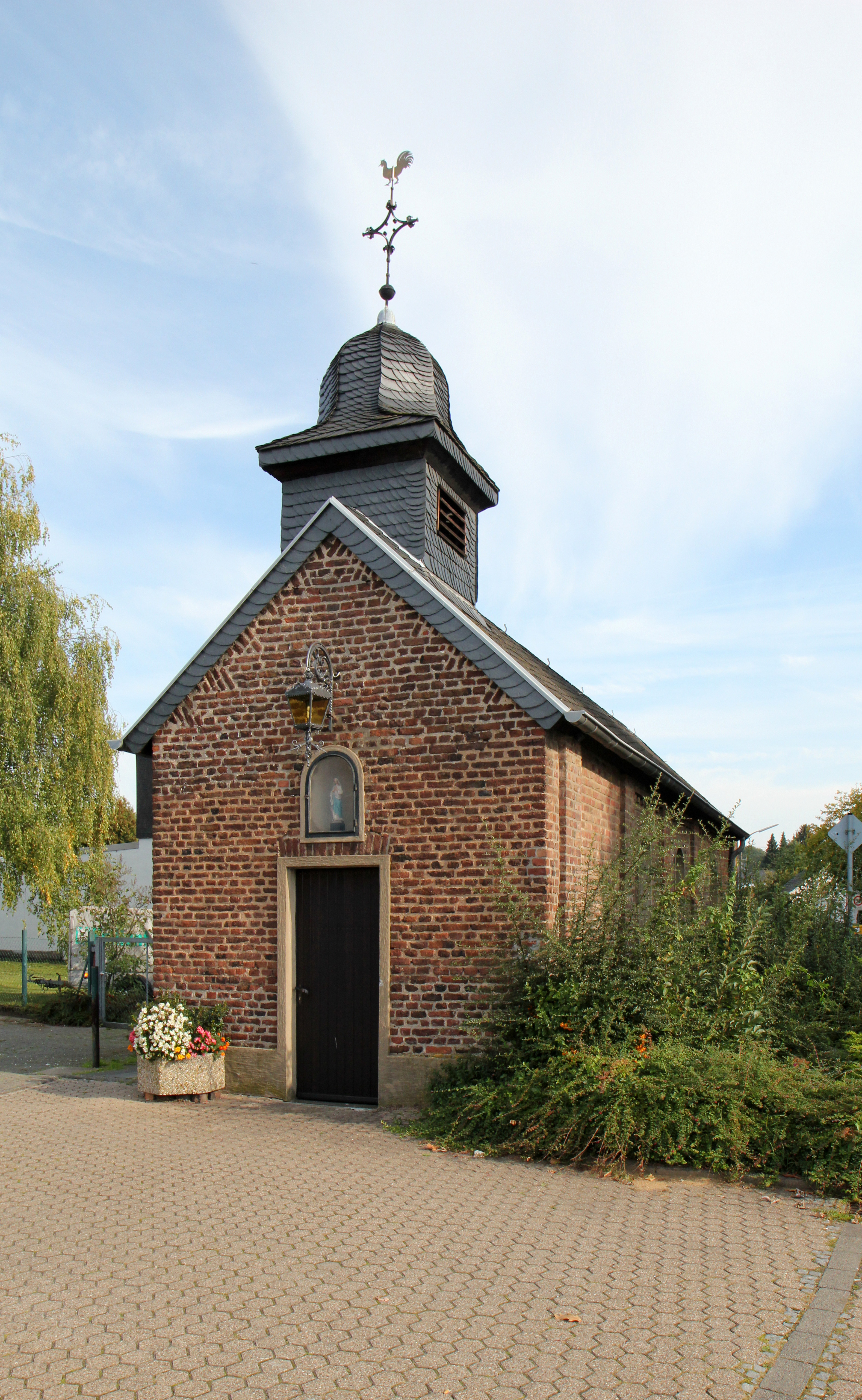 Erftstadt-Köttingen. St. Anna Kapelle, Frontansicht